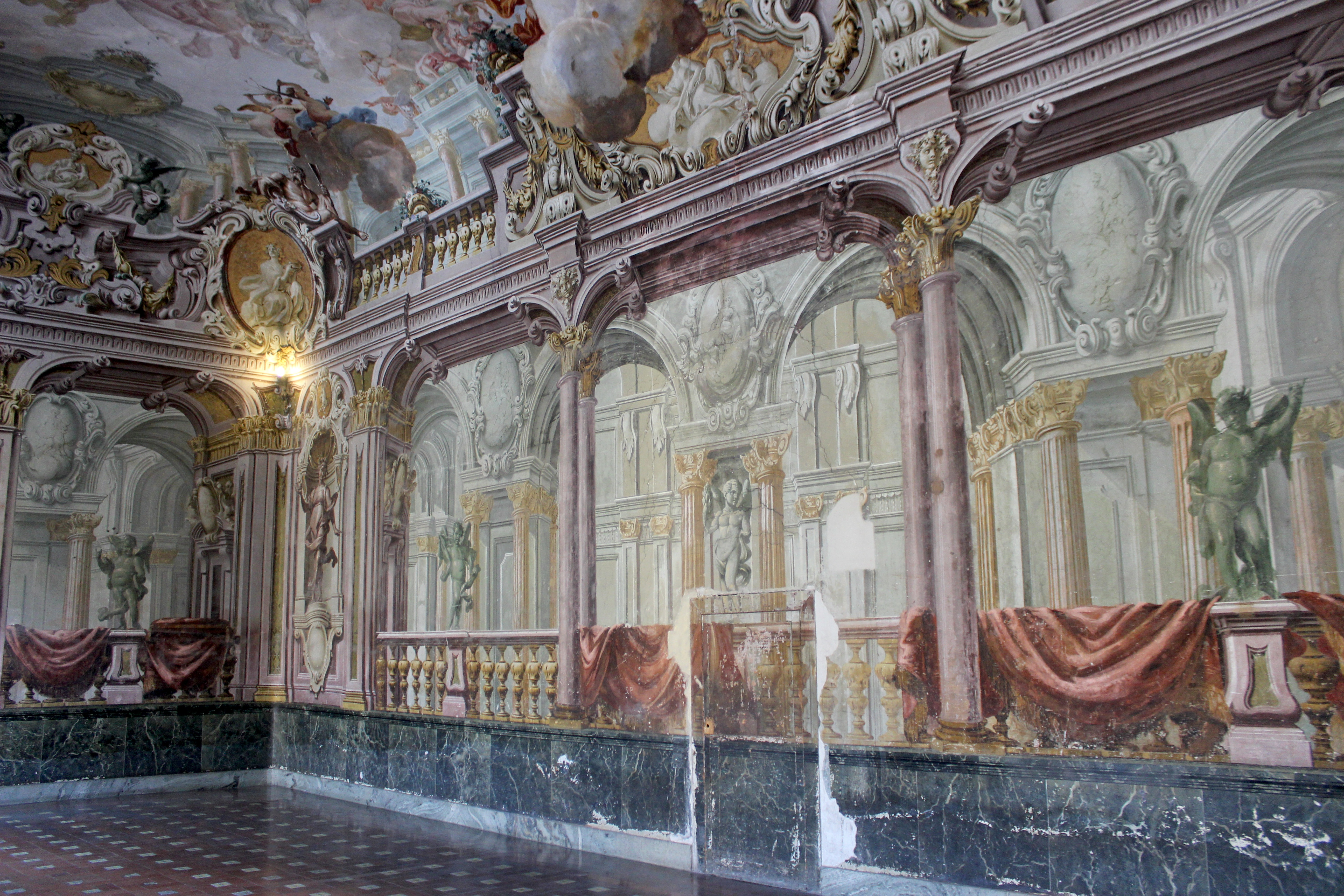 Portici, palacio real, quadratura en uno de los salones. s. XVIII.